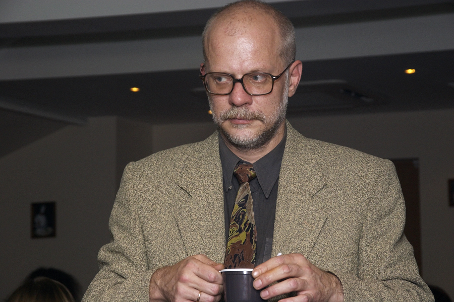 Олег Алексеевич Мудрак на Конференции памяти В. М. Иллич-Свитыча в Москве 21-23.10.2004.